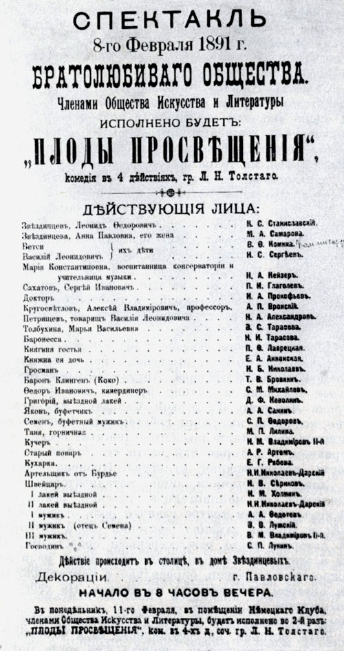 The Fruits of Enlightenment , the poster 1898